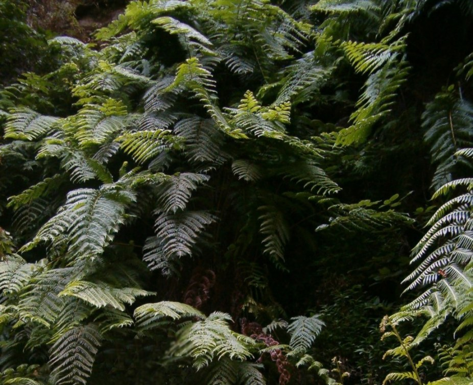 Woodwardia radicans. Helecho gigante en el parque natural de "Los Tilos" en la isla de La Palma (Canarias)